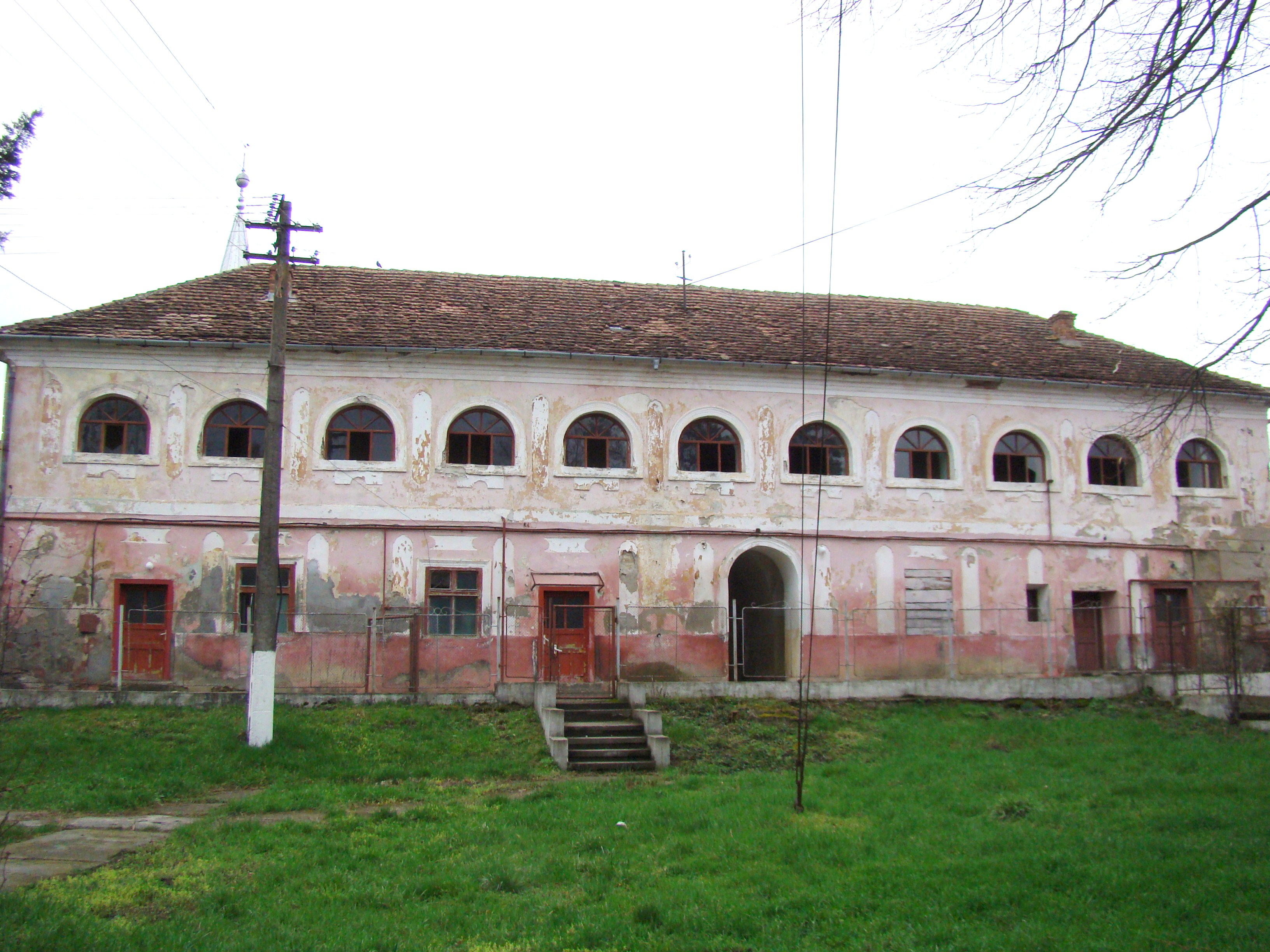 Castelul Rhédei-Rothenthal, Corp B, sat Seuca; comuna Gănești 02